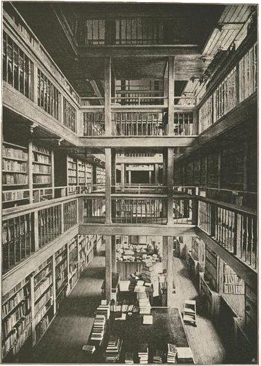 Norsk (bokmål): «Bogsal til Karl Johans gade. Før indsætningen af tvergalerier.» Boksal ved universitetsbiblioteket i Kristiania.